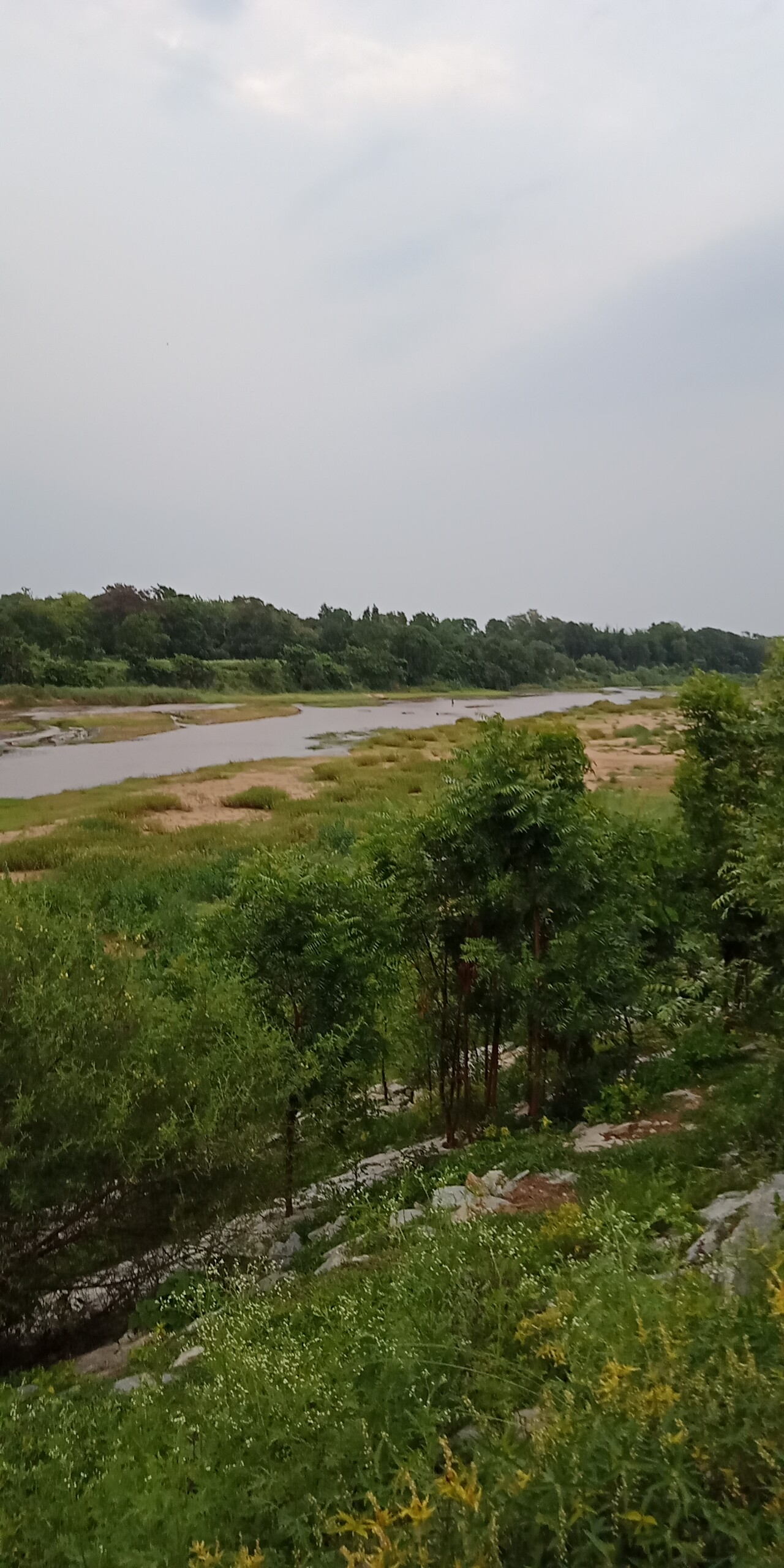 ଓଡ଼ିଆ: ବୁଢାବଳଂଗ ନଦୀ